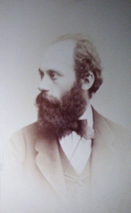 Joseph Boettinger (1839-1914), český fotograf